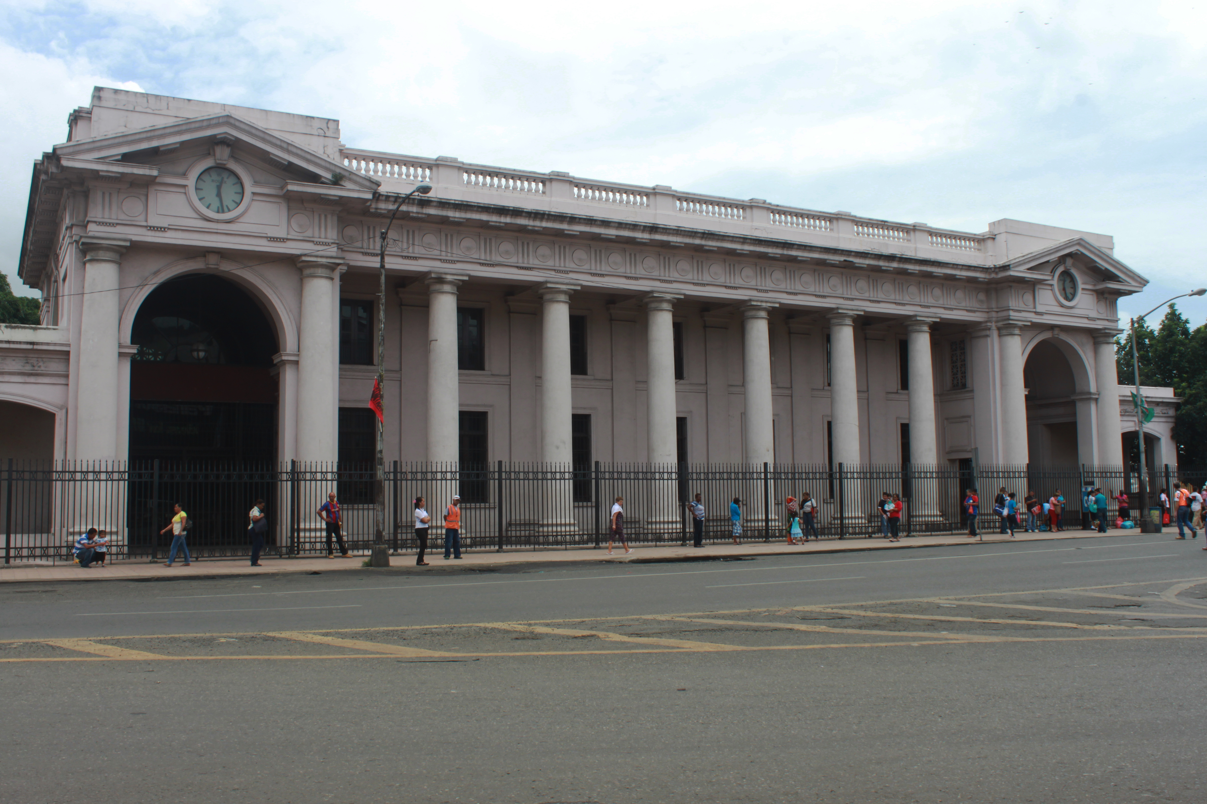 Antiguo Museo Reina Torres de Araùz. Antes de obtener este nombre se le conocía como Museo del Hombre Panameño. actualmente es el Instituto Superior de las Bellas Artes.